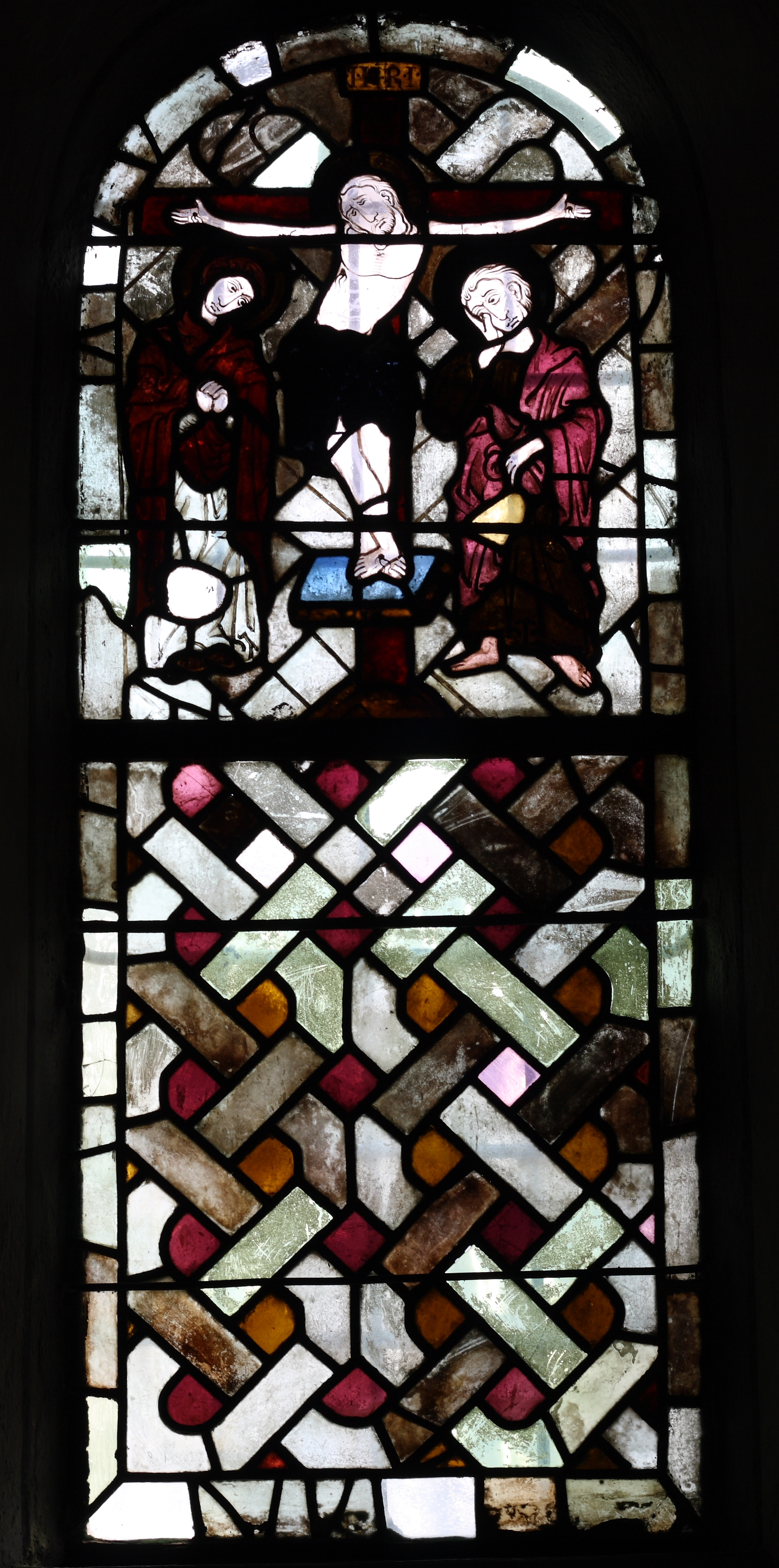 Bleiglasfenster im Chor der Kapelle St. Wendelin in Koisdorf, Darstellung: Kreuzigung